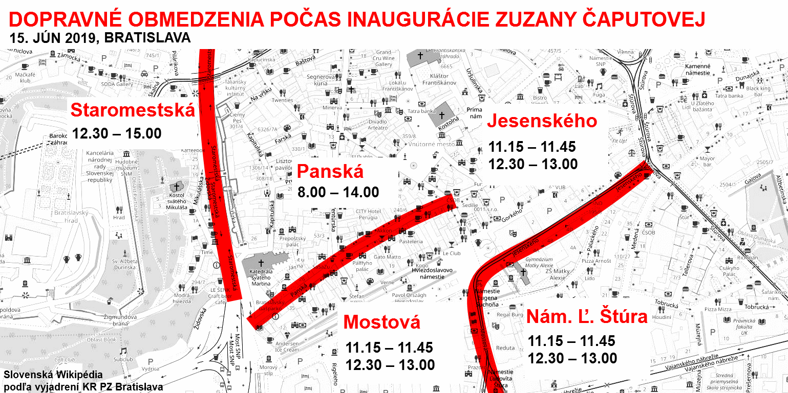 Wikipedická mapa starého mesta s dopravnými obmedzeniami počas inaugurácie Zuzany Čaputovej